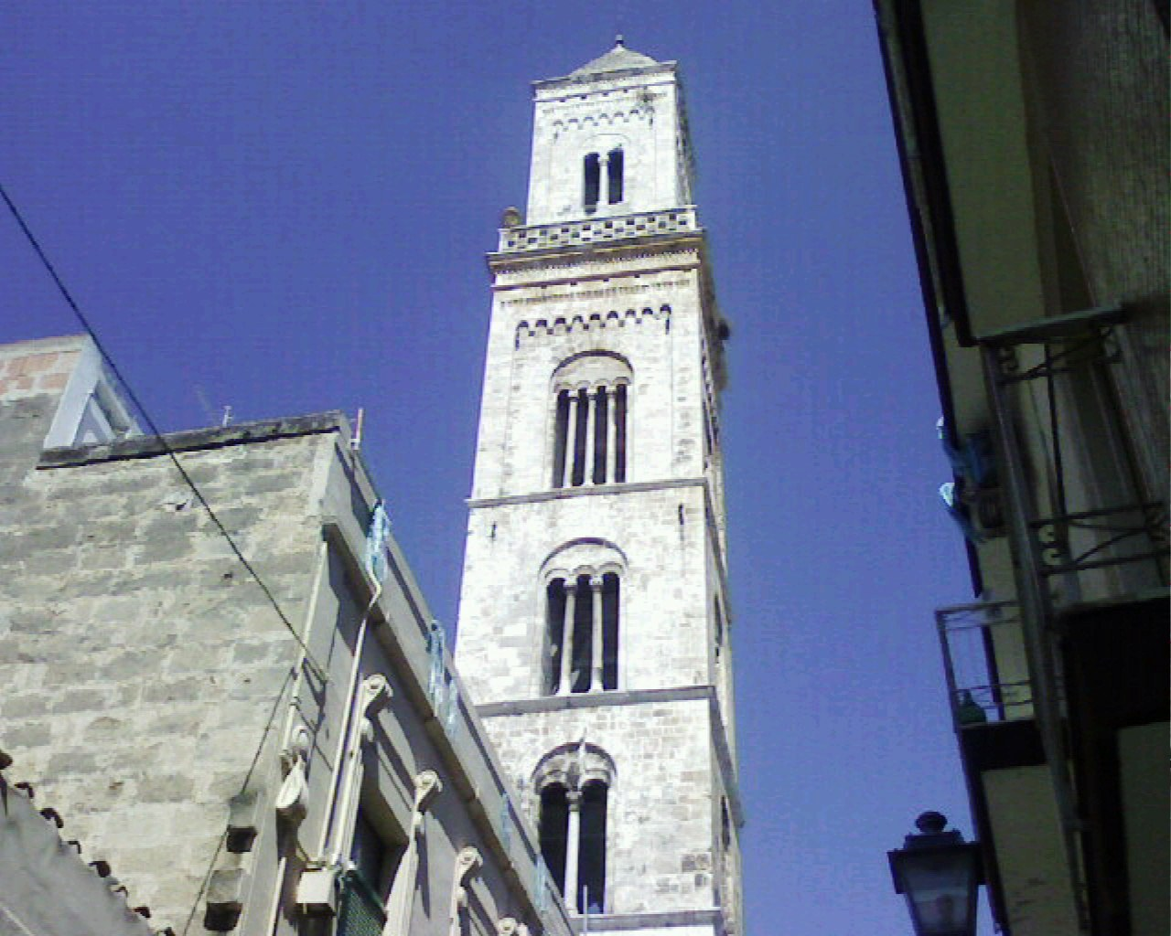 campanile-modugno